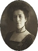 Alma Isabel Sofia Hedin, född 22 april 1876, död maj 1958, i Stockholm, ogift, välgörenhetsidkare